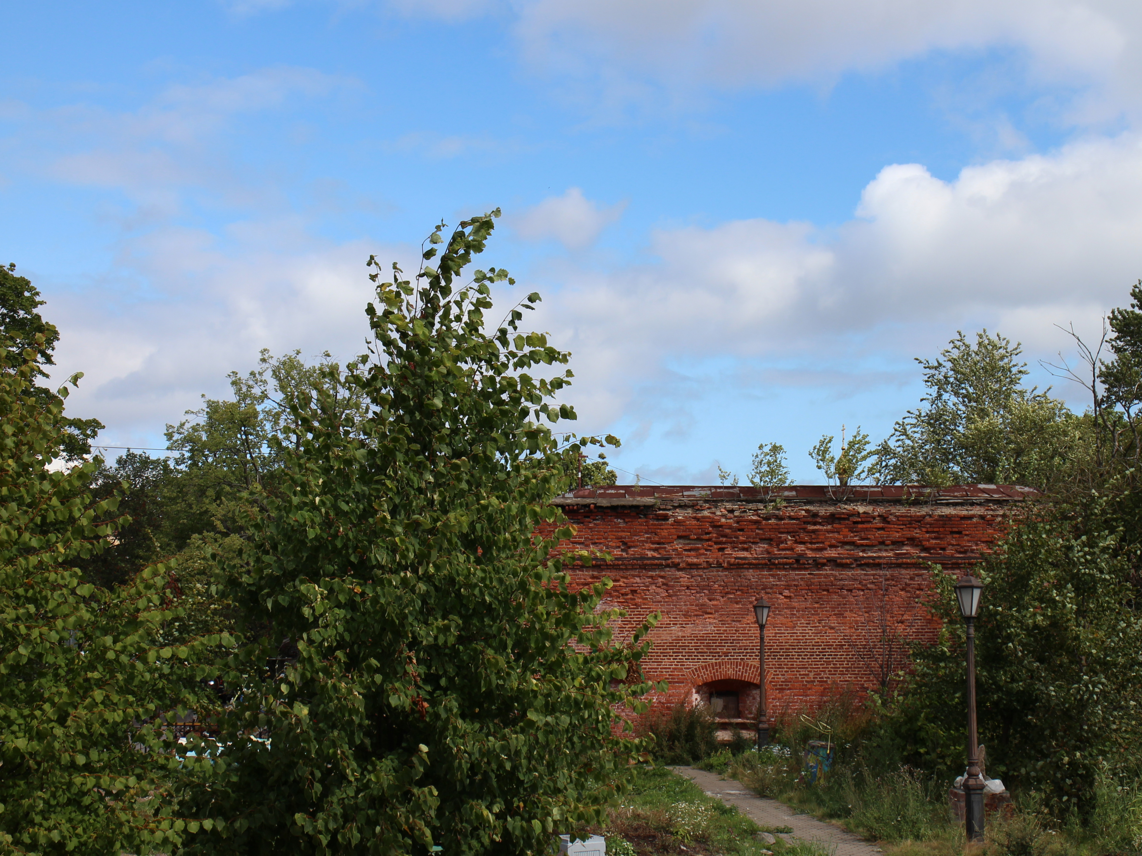 Кронштадтская крепость: Ленинградская улица, Кронштадт, Кронштадтский район, Санкт-Петербург